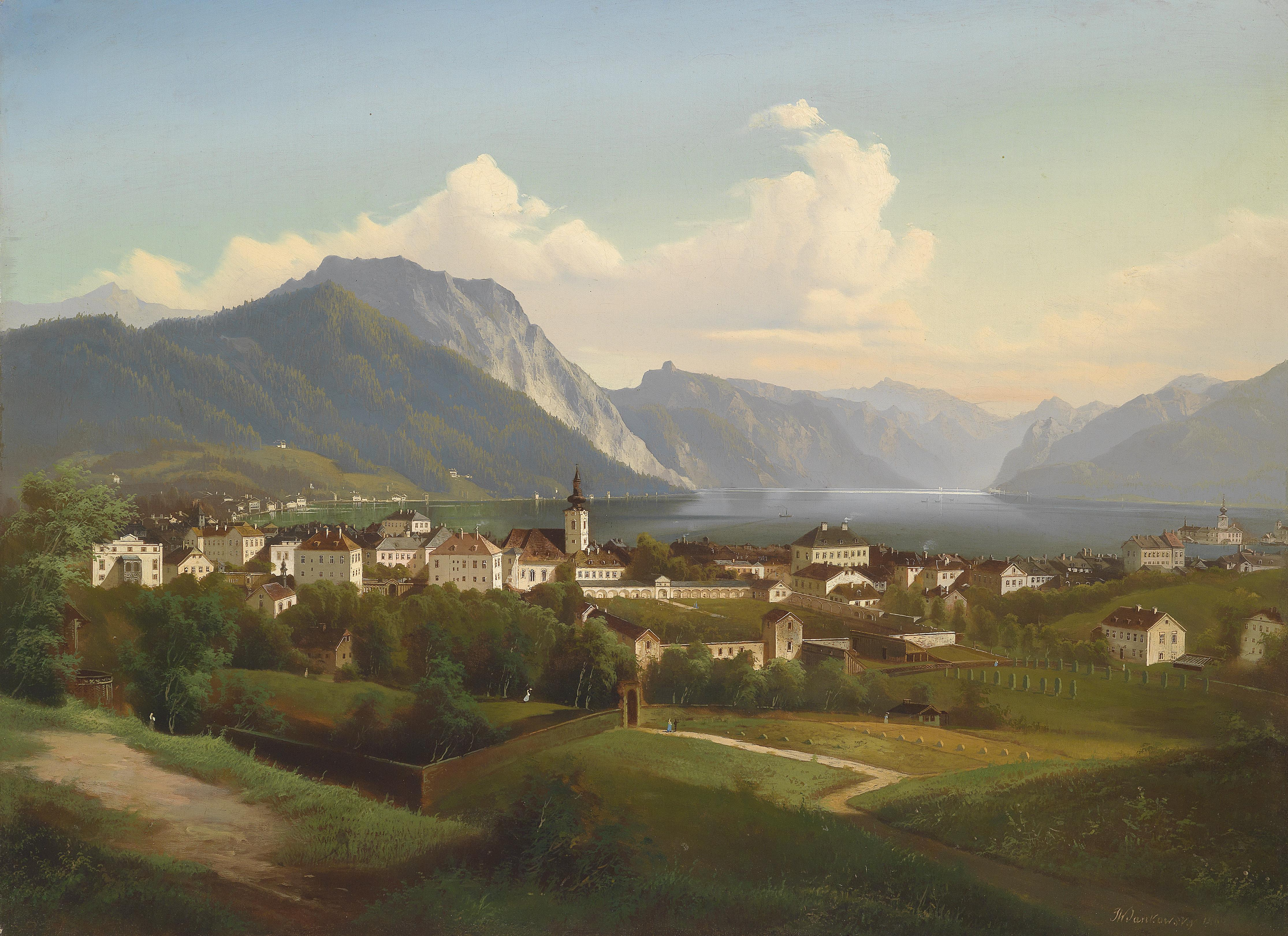 Blick auf Gmunden und Schloß Orth am Traunsee, signiert und datiert J. W. Jankowsky 1860, Öl auf Leinwand, 73 x 100 cm